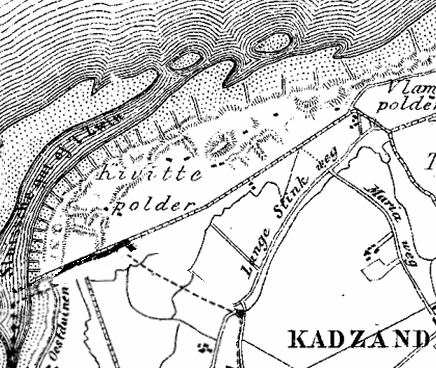 Kievittepolder